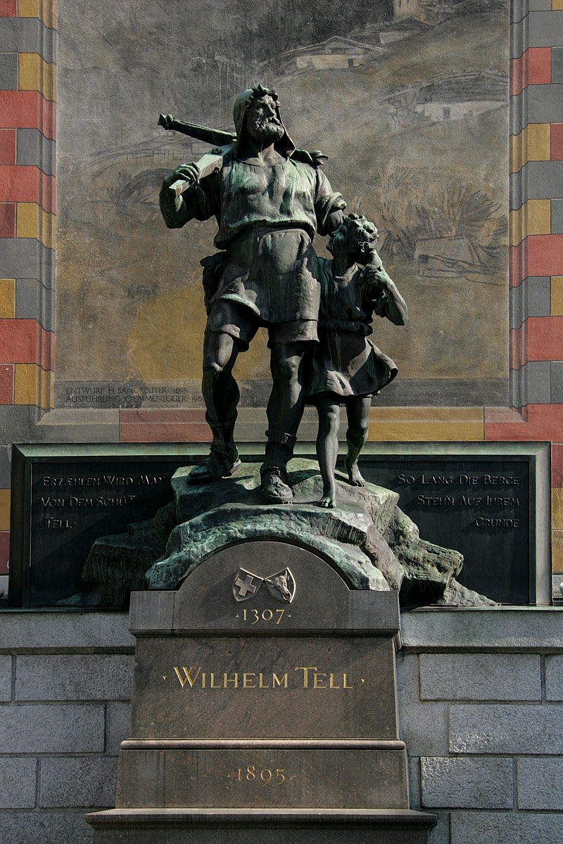 Kapuzinerkloster Allerheiligen in Altdorf